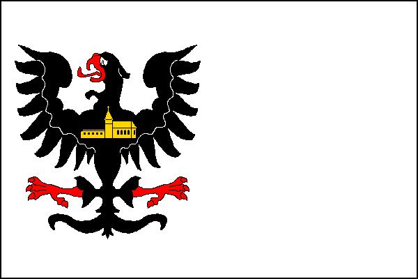 Vlajka obce Kočí (okres Chrudim)